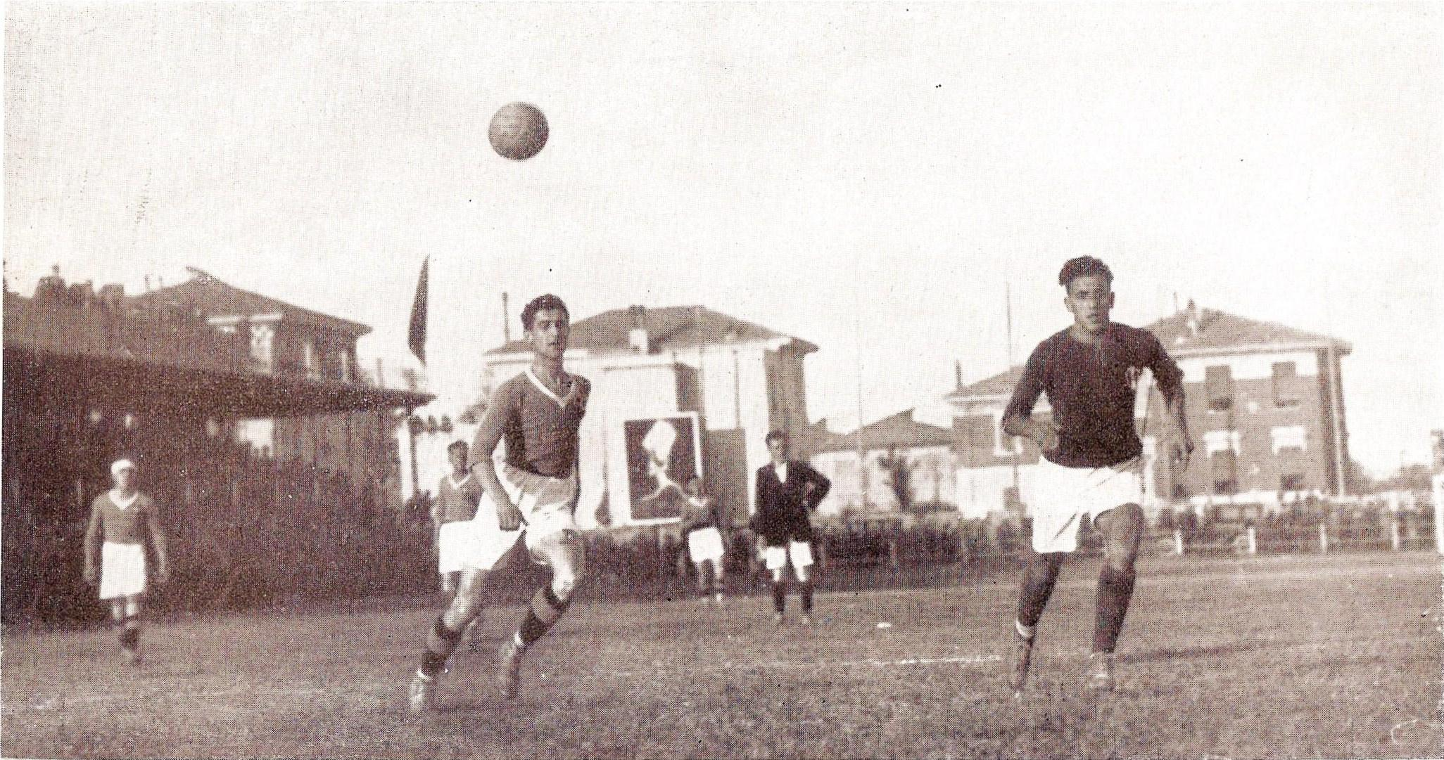 Bologna (Italia), stadio Sterlino, 11 ottobre 1925. Una fase di gioco della sfida tra Bologna FC e FBA Novara (4-1) valevole per la 2ª giornata del campionato italiano di Prima Divisione 1925-26, Lega Nord, girone A; a destra, l'attaccante bolognese Giuseppe Della Valle.